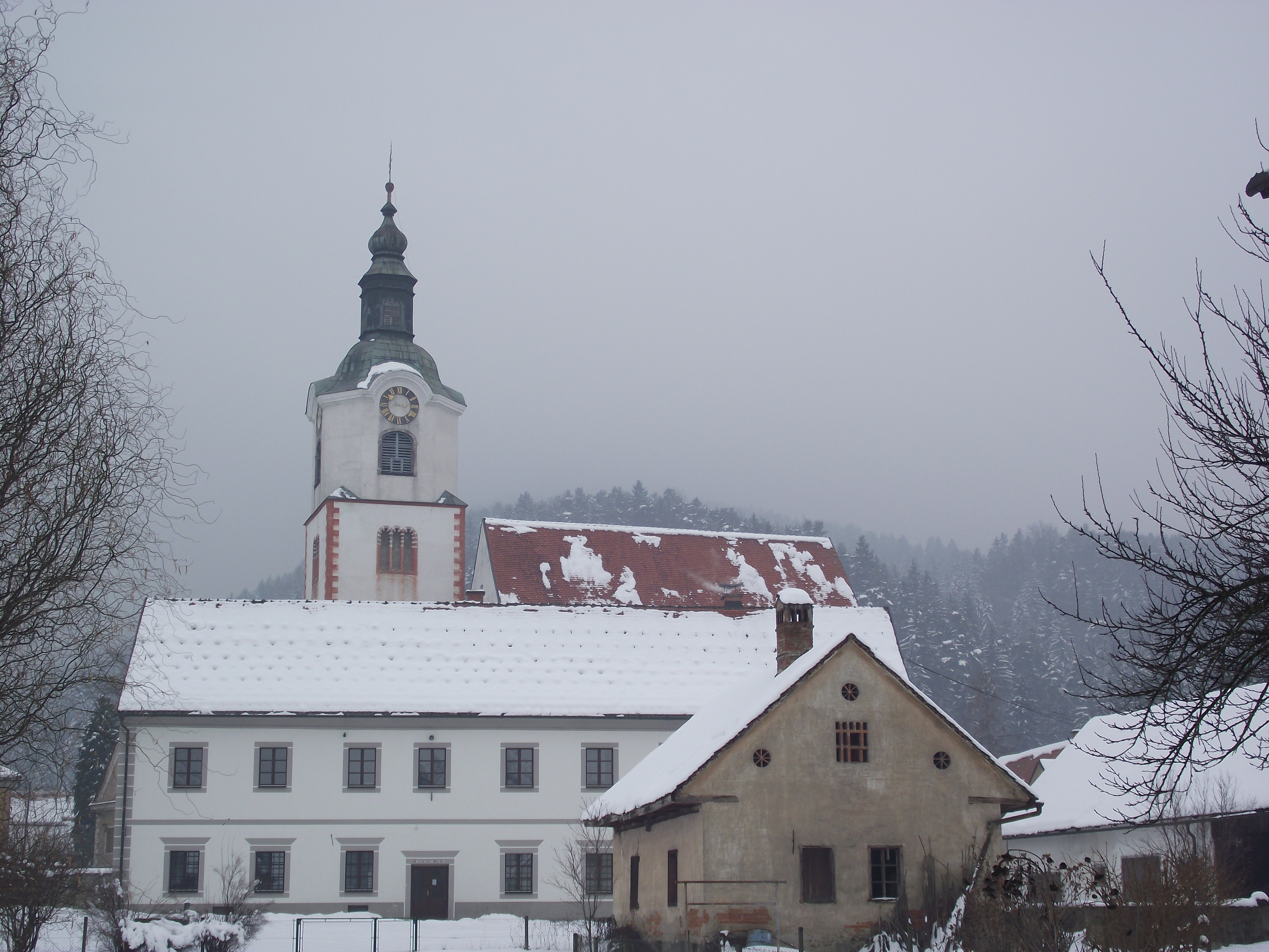 Ruse